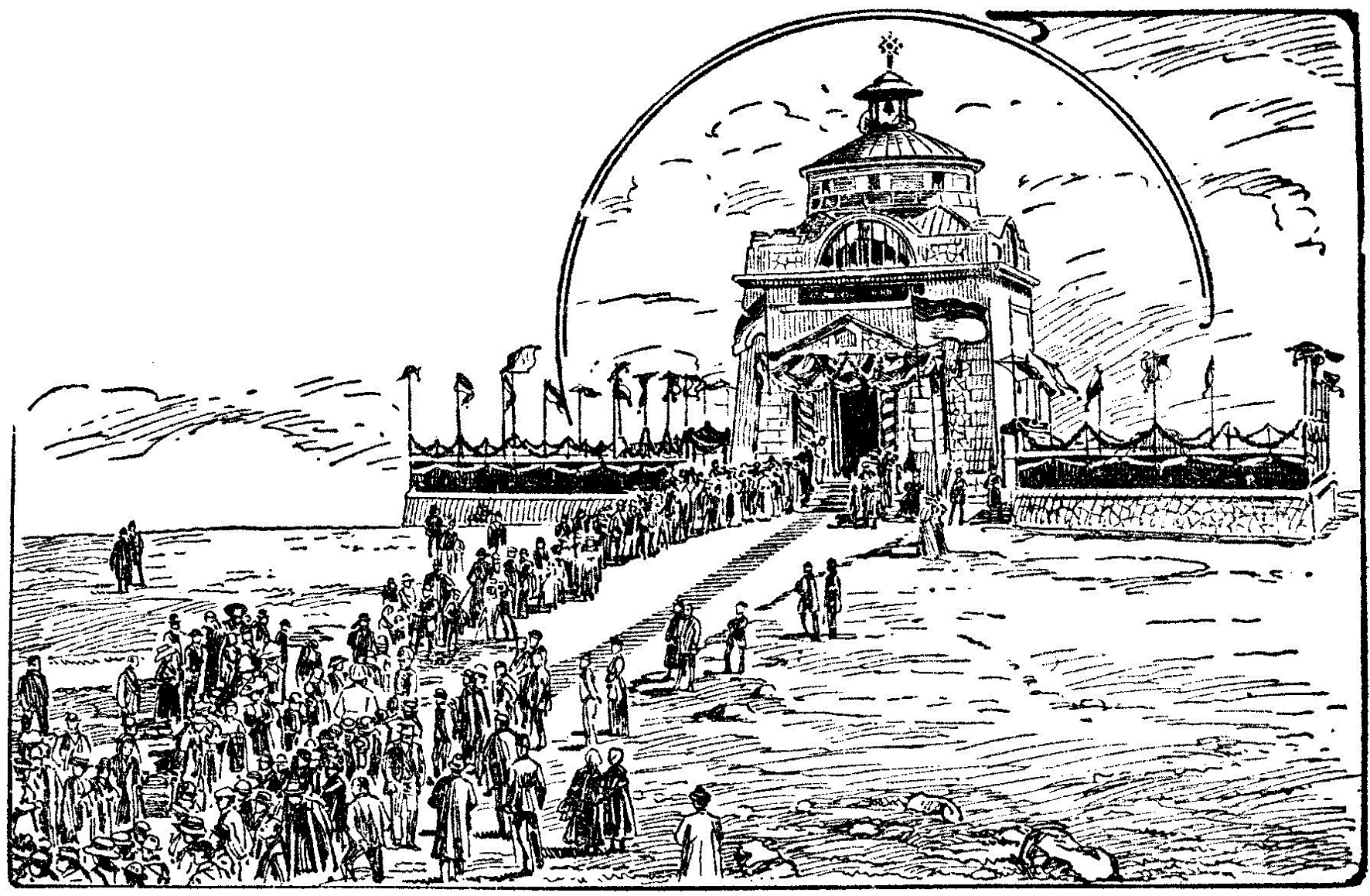 Jahresübersicht Kaiserin-Elisabeth-Gedächtniskirche am Hochschneeberg, 10-Jahres-Feier, 5. September 1911